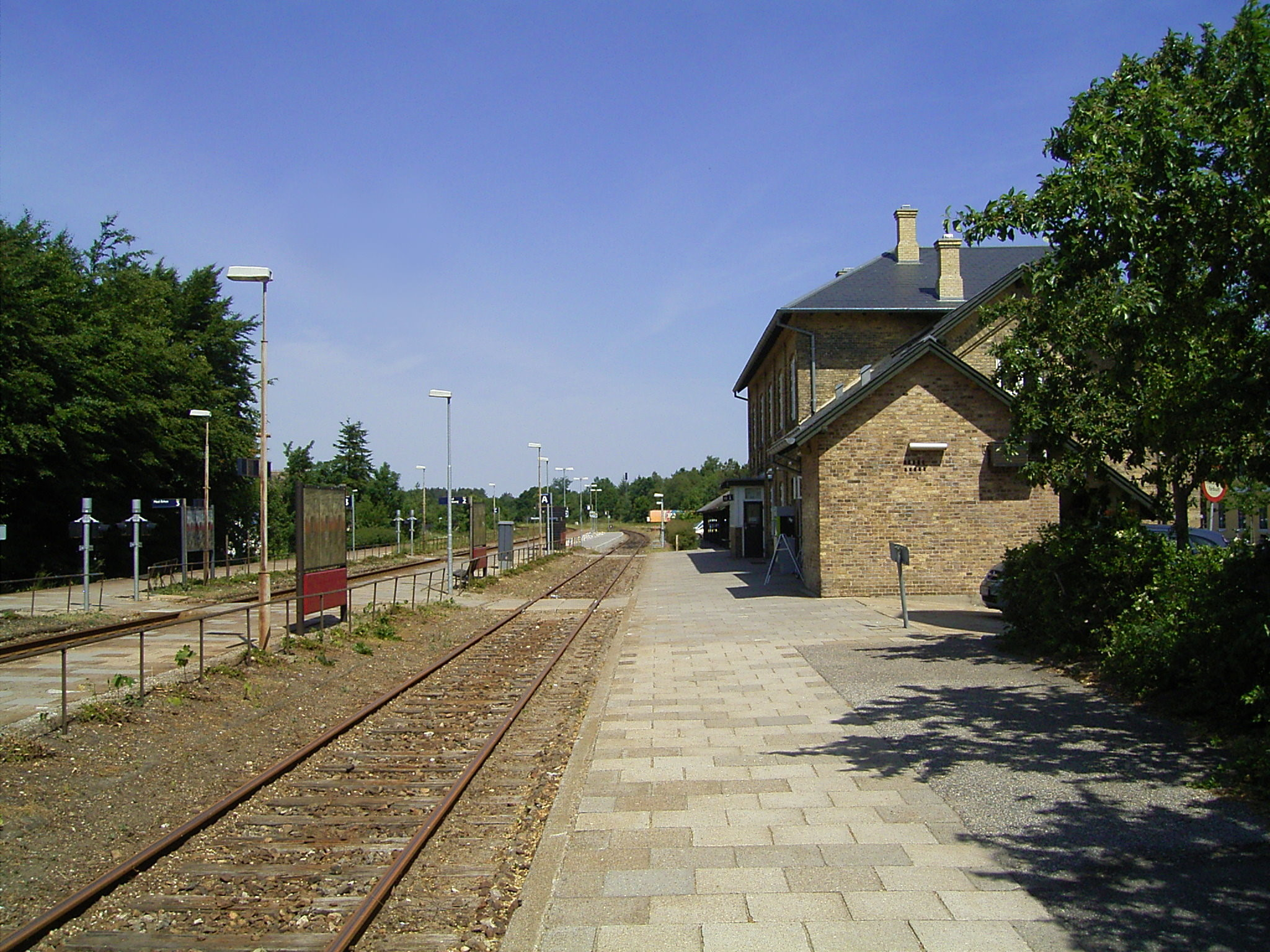 9520 Skørping in Denmark